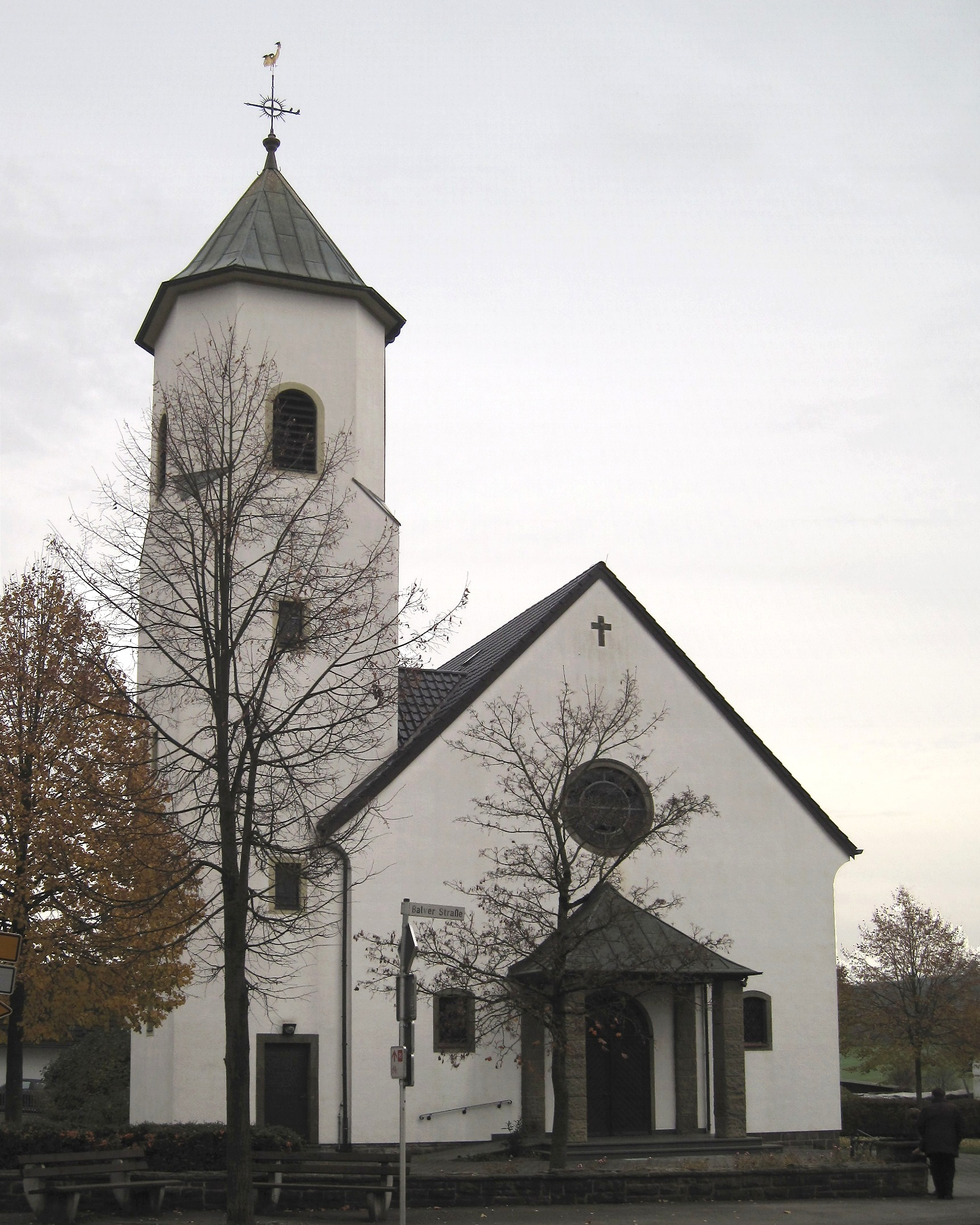 Katholische Kirche St. Barbara in Balve-Mellen, Kirchplatz 4.